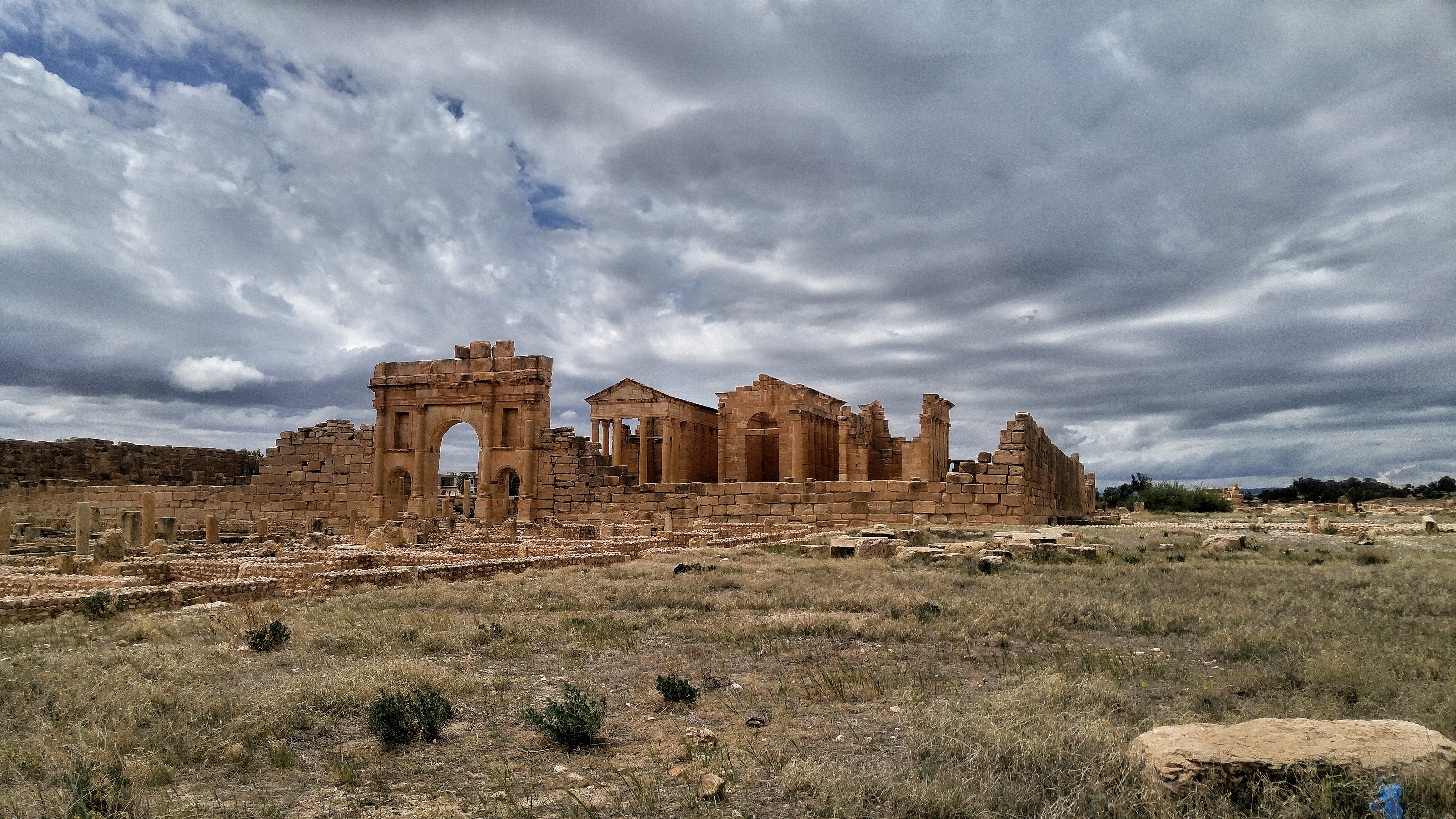 Arc triomphal d'Antonin et de Marc Aurèle devant les temples, Sbeïtla